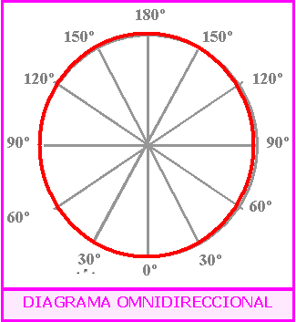 Esquema omnidireccional.